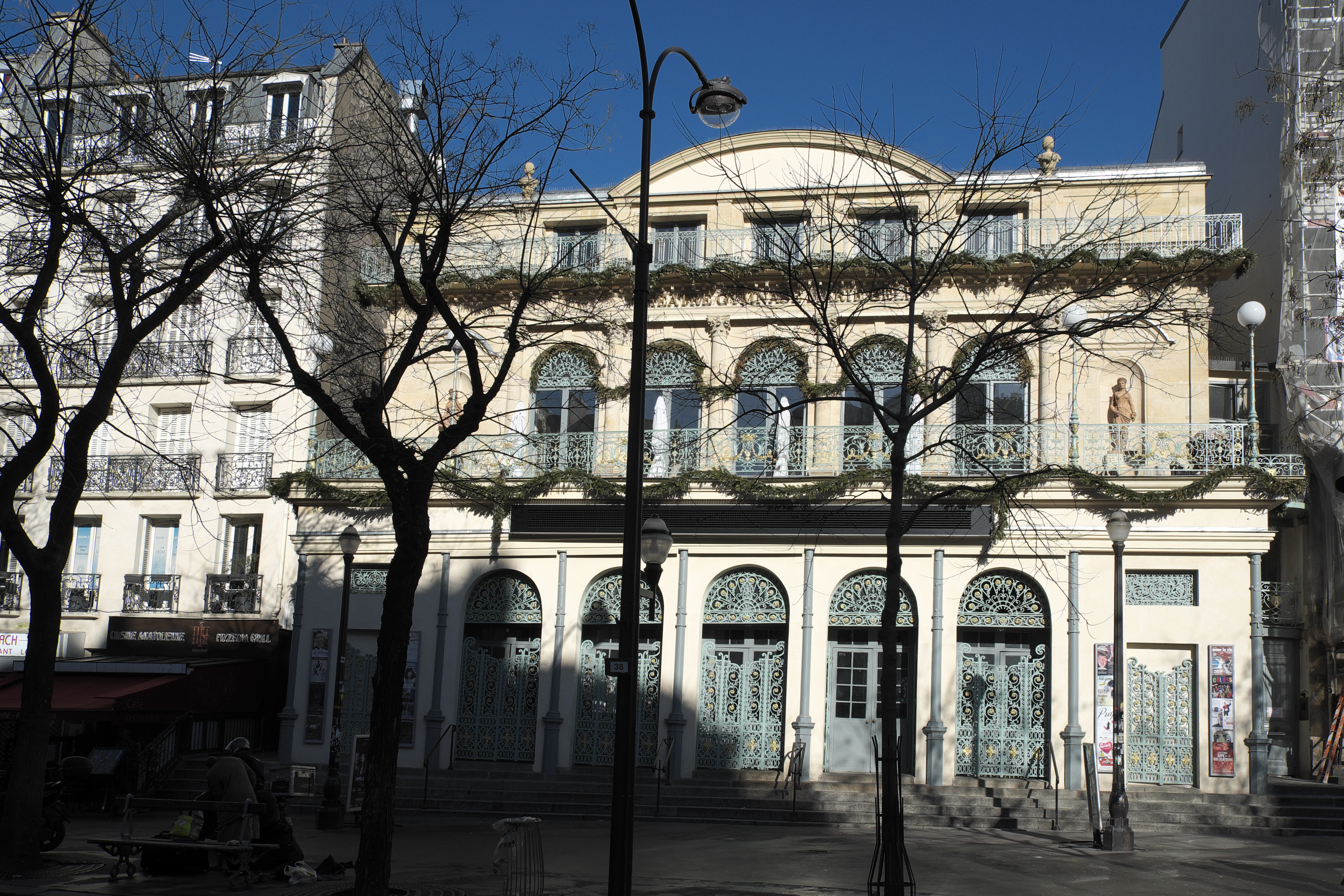 Théâtre du Gymnase Marie Bell am Boulevard Bonne-Nouvelle Nr.38 im 10. Arrondissement in Paris